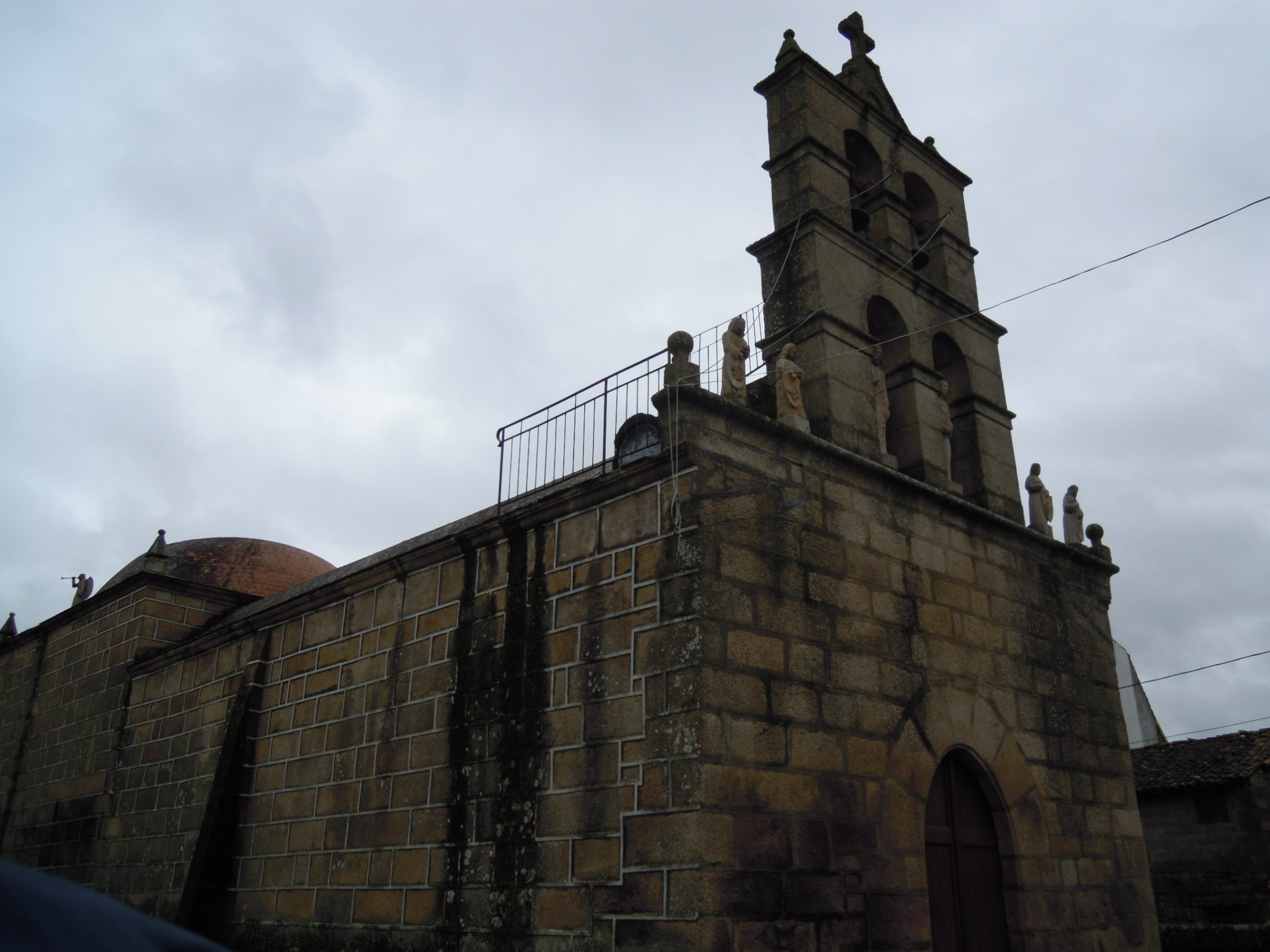 Igrexa parroquial de Tamaguelos (Verín).